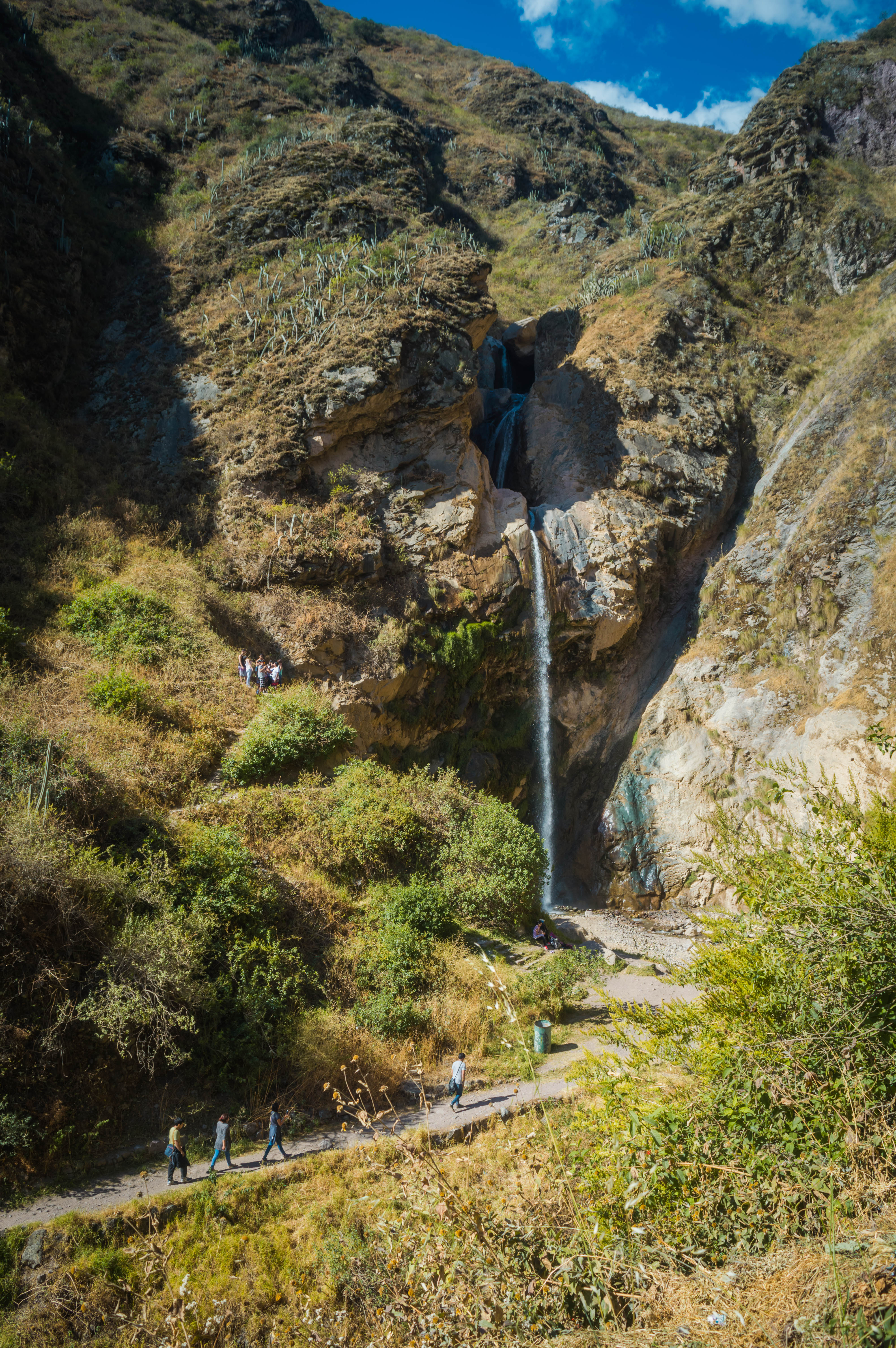 Una vista de las cataratas de Antakallo en el mes de Julio